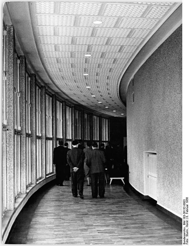 Berlin, Nalepastraße, Sendeanstalt, Wandelgang Zentralbild Sturm 8.2.56 Neuer moderner Komplex für die künstlerische Produktion im Funkhaus Berlin Der am 16. Februar 1955 durch Brandstiftung zerstörte große Sendesaal des Staatlichen Rundfunkkomitees Berlin, Nalepastrasse, ist nach modernsten Gesichtspunkten wiederaufgebaut worden. Daneben wurden einige kleinere Sendesäle eingerichtet. Zu jedem Sendesaal gehört ein Regieraum. Am 8.2.56 fand im Funkhaus eine Pressekonferenz statt mit anschliessender Besichtigung der neuen Räume durch die Pressevertreter. UBz: Wandelgang im Funkhaus.